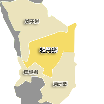 中文（台灣）: 屏東縣牡丹鄉相對位置。